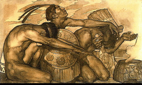 Saturnino Нerran drawing 1917.jpg: малюнок